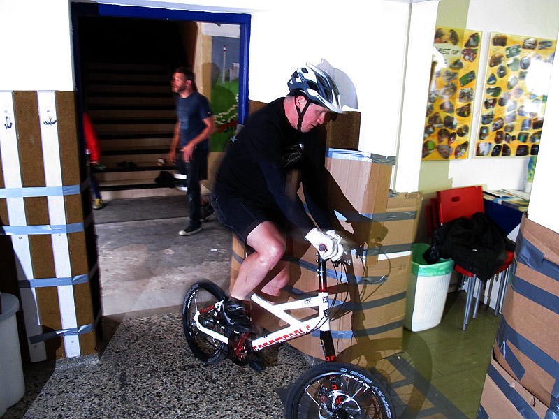 Beim "Altbaukriterium" in Gleisdorf: Es zählt nicht nur Tempo, die Füße müssen auf den Pedalen bleiben.